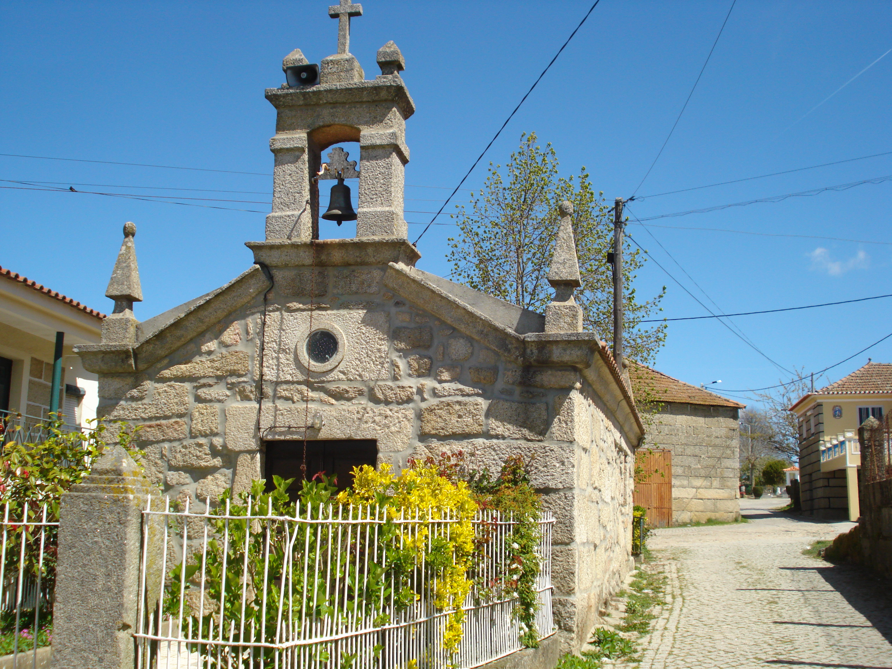 Maços-Capela de Santo Amaro